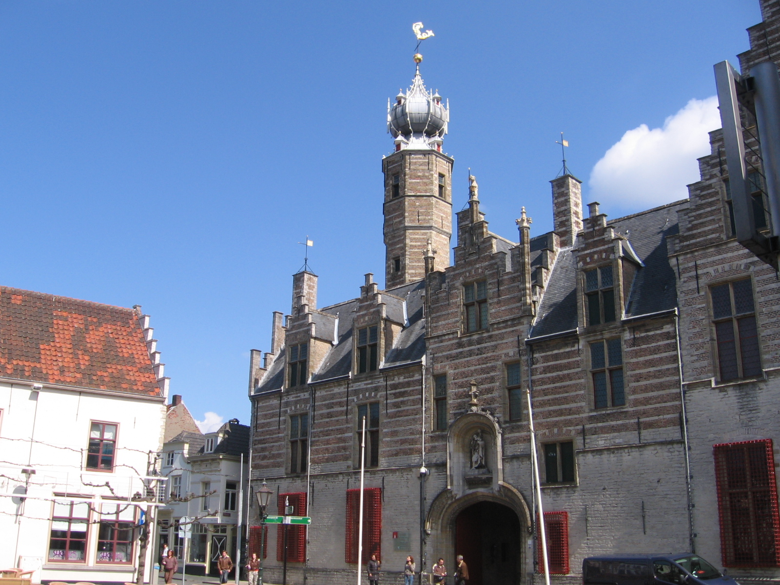 Het Markiezenhof te Bergen op Zoom, 17 april 2006